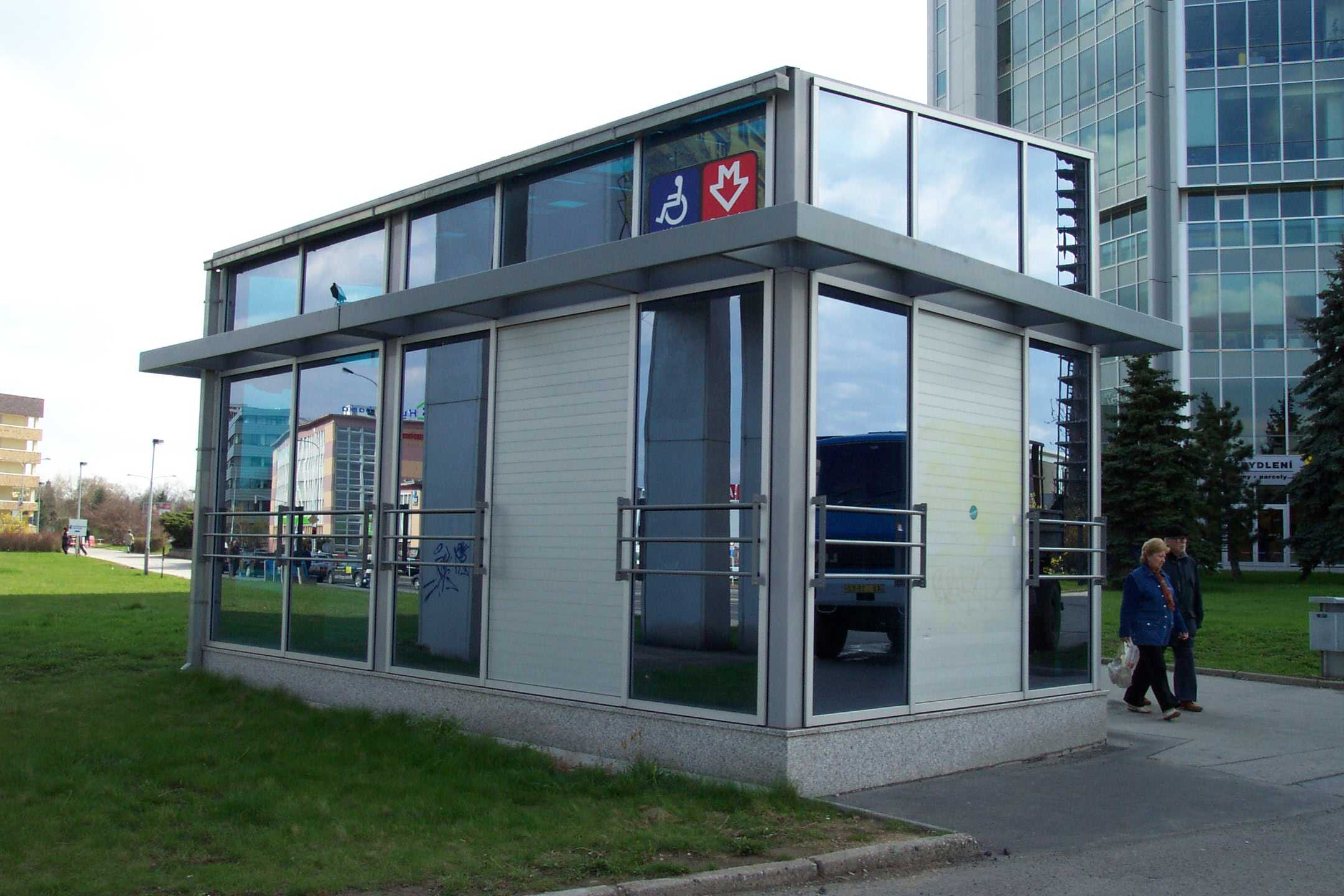 Lift of metro station Pankrác - Výtah ve stanici metra Pankrác